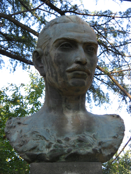 Vitaliano Brancati, busto - Parco Comunale di Zafferana Etnea (CT) - Foto D. Pennisi.